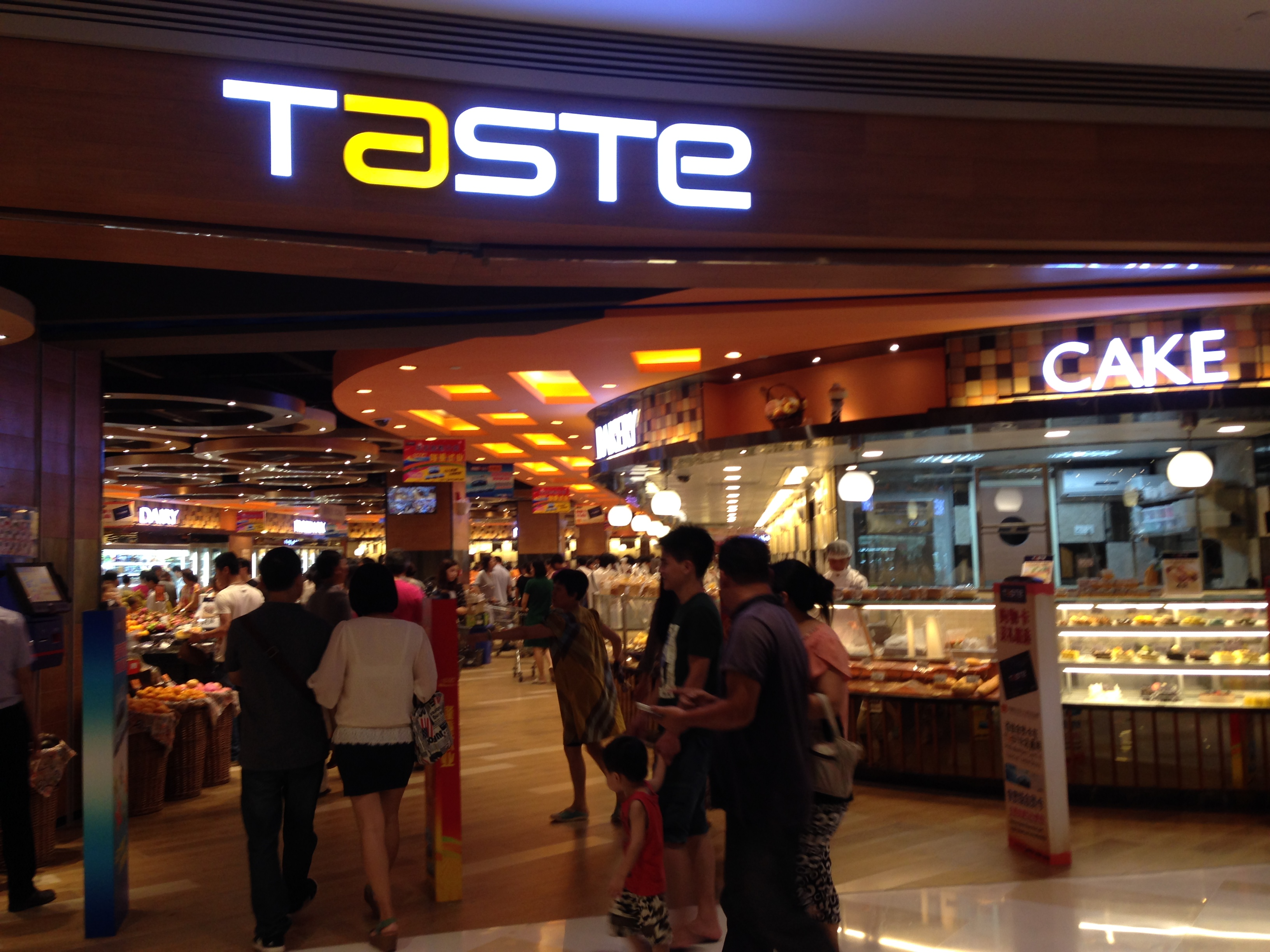 Taste在珠海华发商都分店